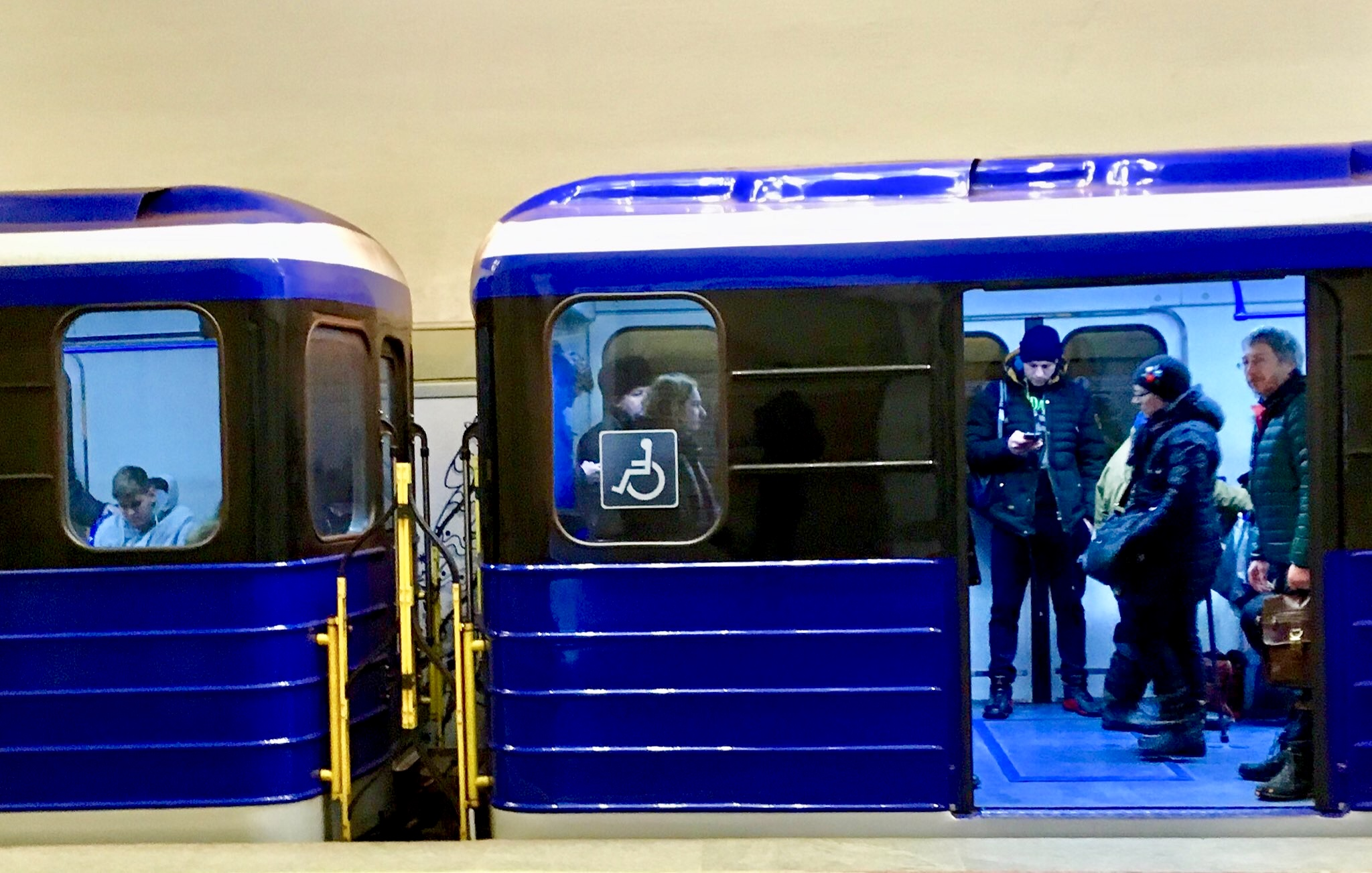 Харків модернізований склад